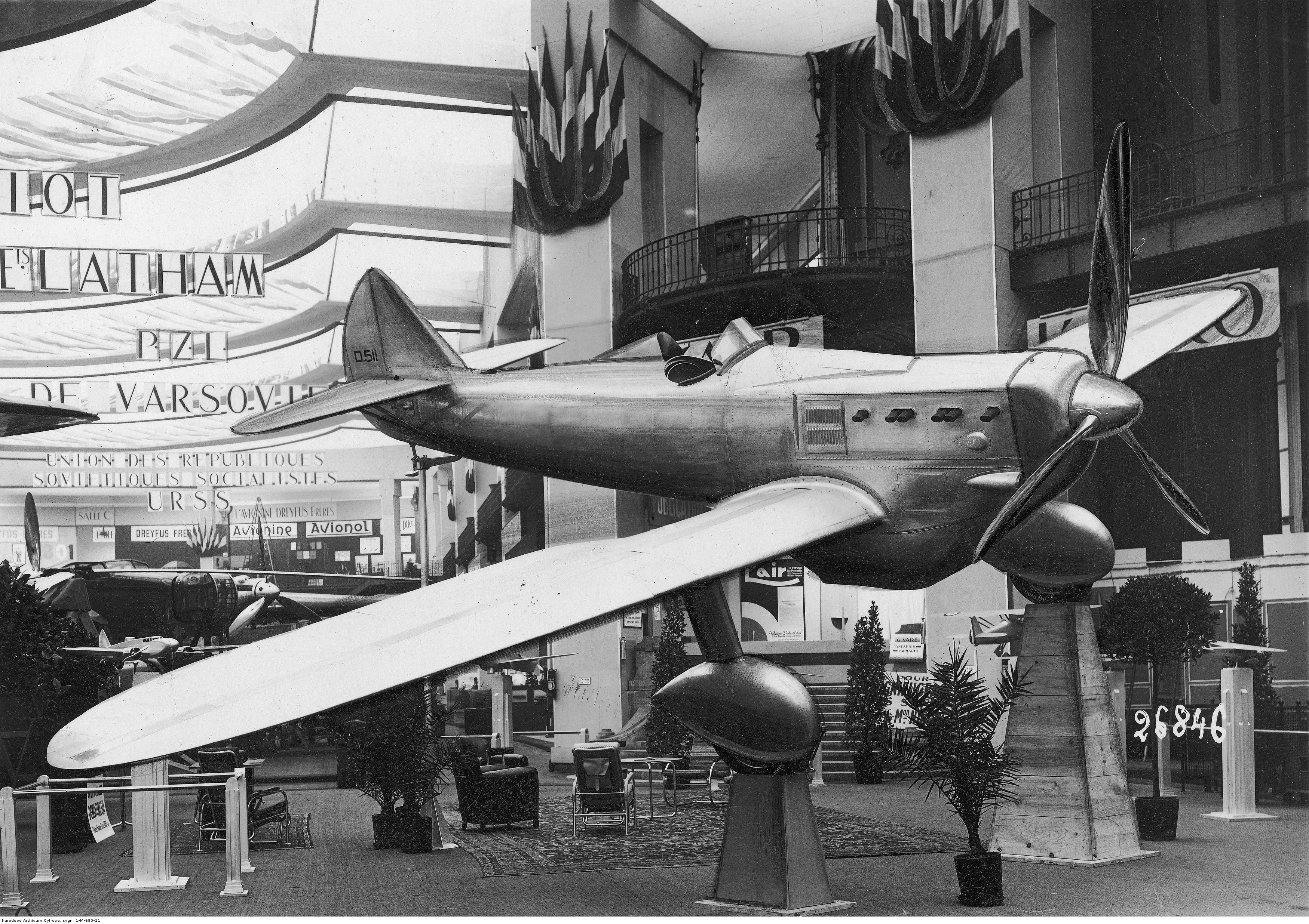 Dewoitine D.511 eksponowany na Międzynarodowym Salonie Lotniczym w Paryżu.